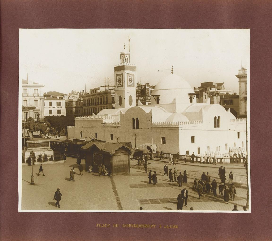 Fait partie de : "Voyage en Algérie de M. Alexandre Millerand, président de la République française 16-26 avril 1922